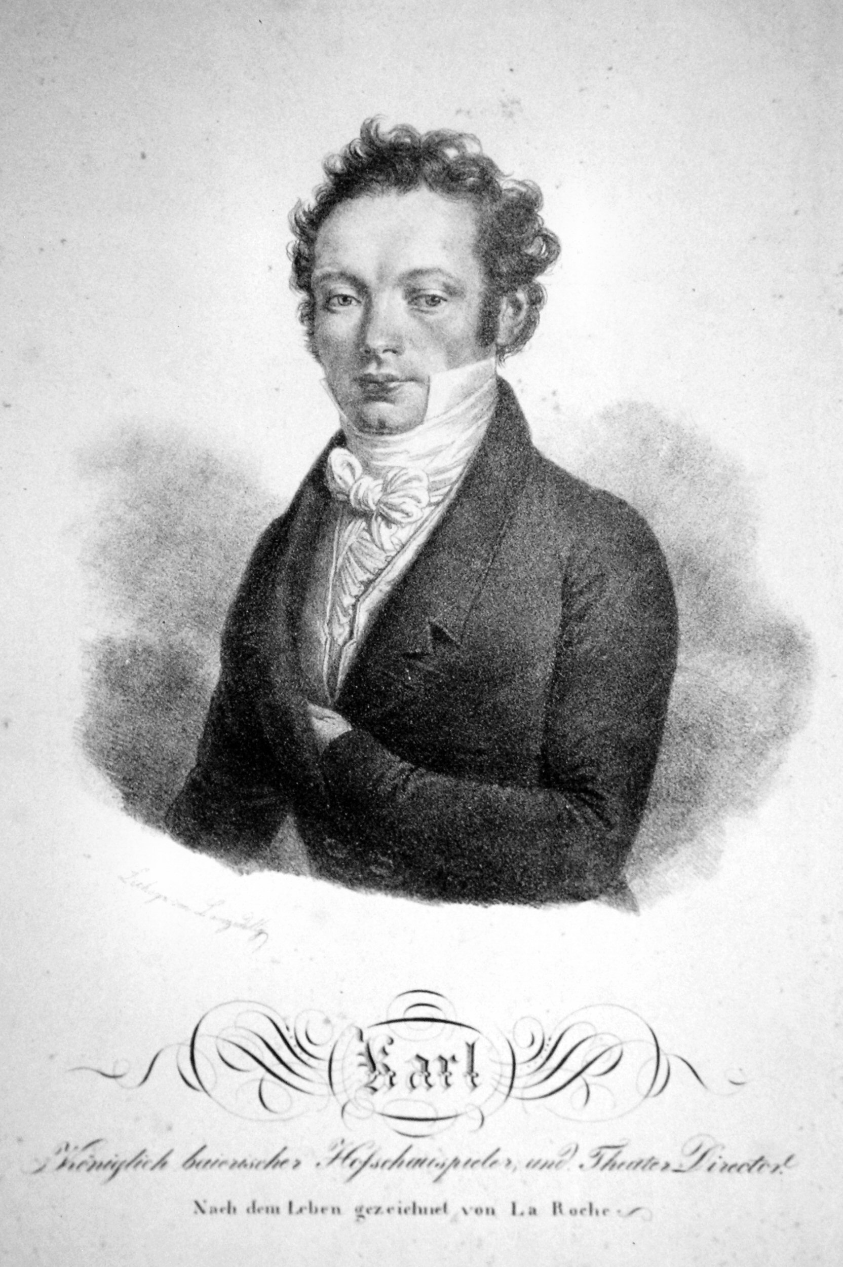 Karl Andreas von Bernbrunn (Pseudonym Carl Carl), Lithographie von Josef Lanzedelli d. Ä.